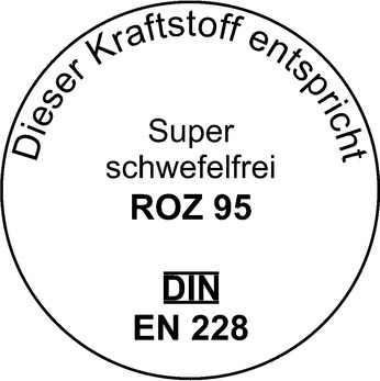 Zapfsäulenaufkleber für Super schwefelfrei gemäß 10. BImSchV; BGBl. I 2014, 1894